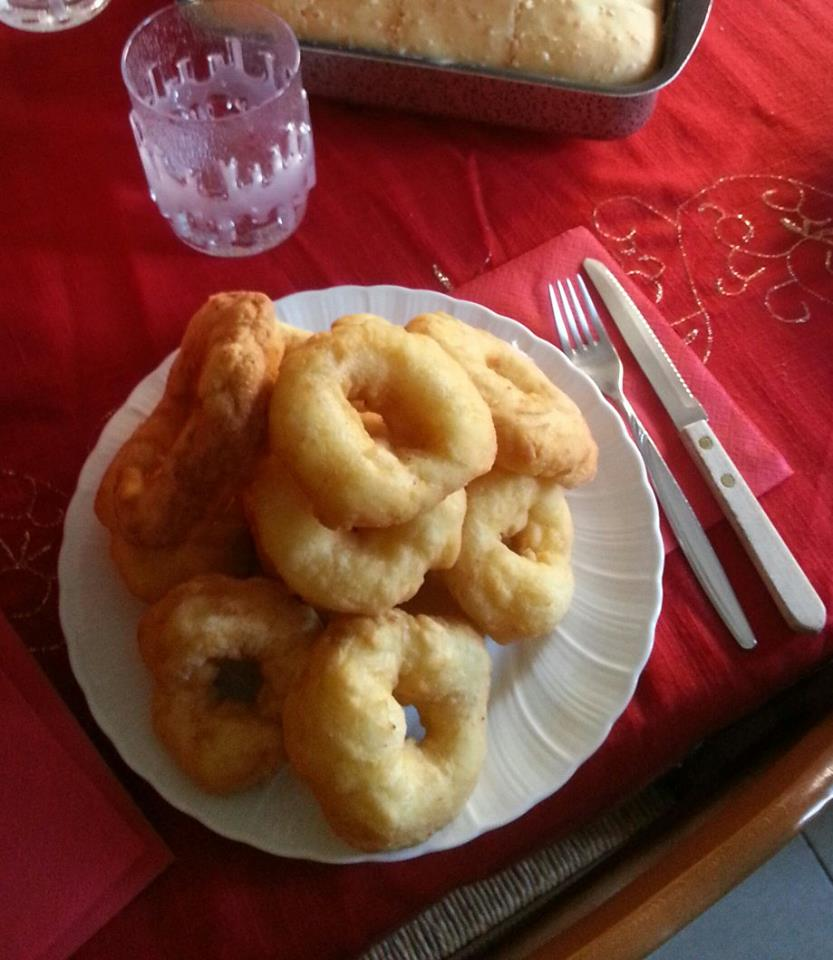 UN PIATTO DI CUDDRURIADDRI COSENTINI, SPECIALITA' DEL PERIODO NATALIZIO NELLA CITTA' DEI BRUZI